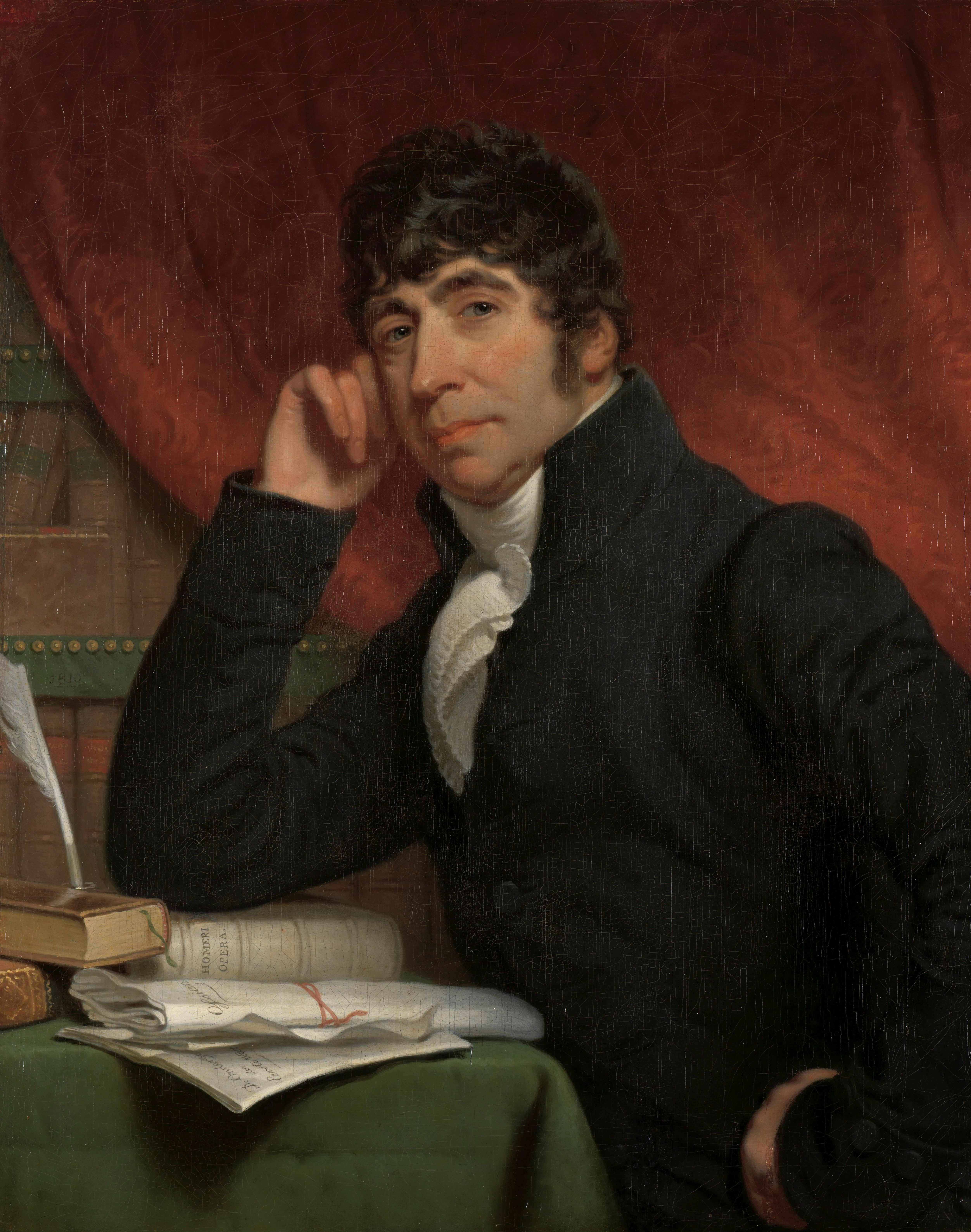 Portret van Willem Bilderdijk, dichter en geschiedschrijver. Ten halven lijve, zittend aan een tafel waarop hij met zijn rechterelleboog leunt, de linkerhand in de zij. Op tafel liggen boeken (waaronder 'Homeri Opera') en papieren. Tegen de achterwand een boekenkast waar een gordijn deels voor hangt.; Charles Howard Hodges (1764-1837), olieverf op doek, 1810